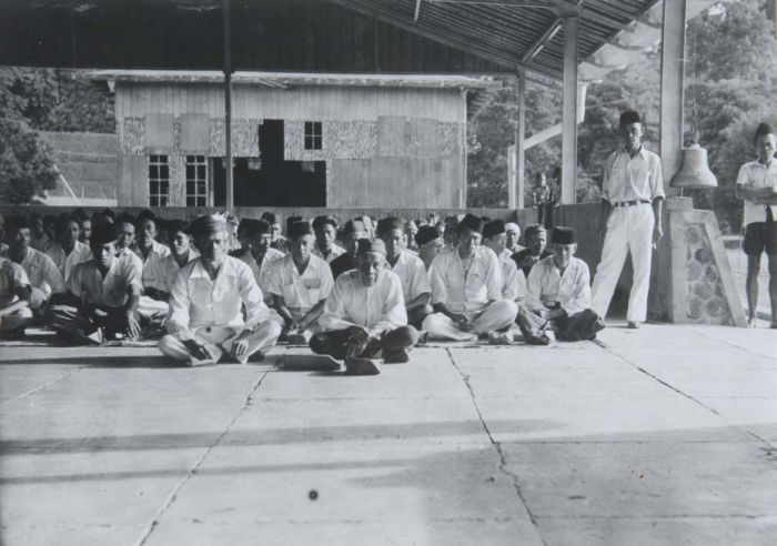 Foto. Slametan vrij Indoneise. Er wordt een dankceremonie gehouden voor de onafhankelijkheid van Indonesie.. Slametan, ter ere van onafhankelijkheid Indonesia